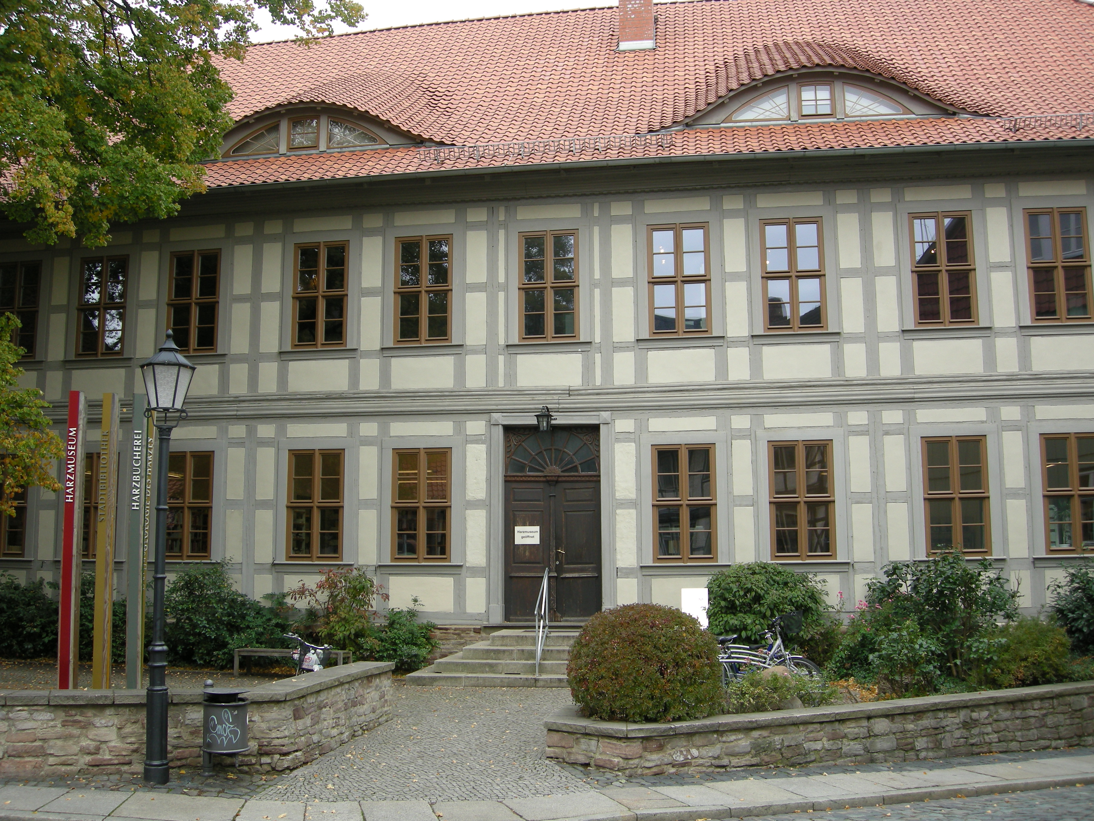 Harzmuseum und Harzbibliothek in Wernigerode